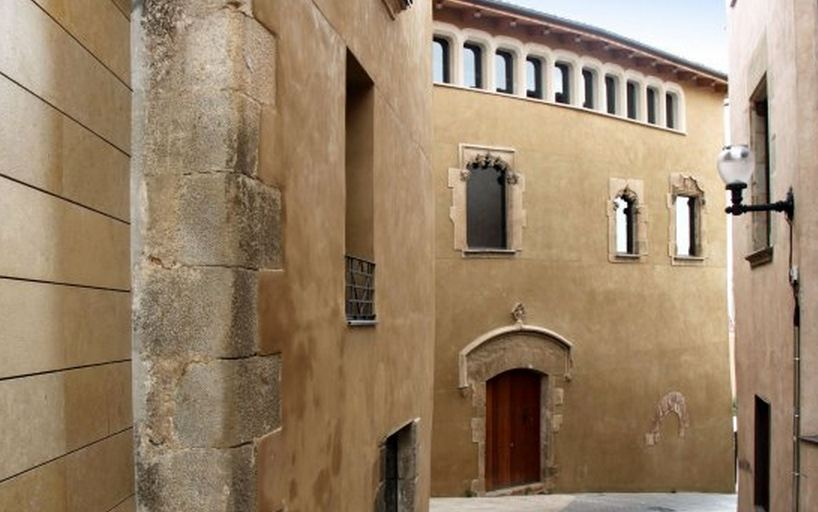 Can Barraquer, antigament Can Bosch (Sant Boi de Llobregat) Casa propietat del llinatge Bosch, la pubilla del qual Maria Bosch es casà amb Rafael Casanova, darrer Conseller en Cap de la Ciutat de Barcelona, defensor de la ciutat durant el setge per part de les tropes borbòniques el 1714.